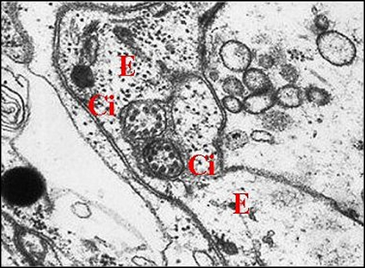 Région ciliaire des deux dendrites avec leurs doublets de microtubules, en coupe transversale, vue au microscope électronique à transmission